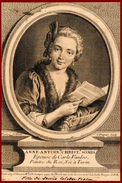 Stich der Christina Antonia Somis, der späteren Ehefrau von Charles André van Loo